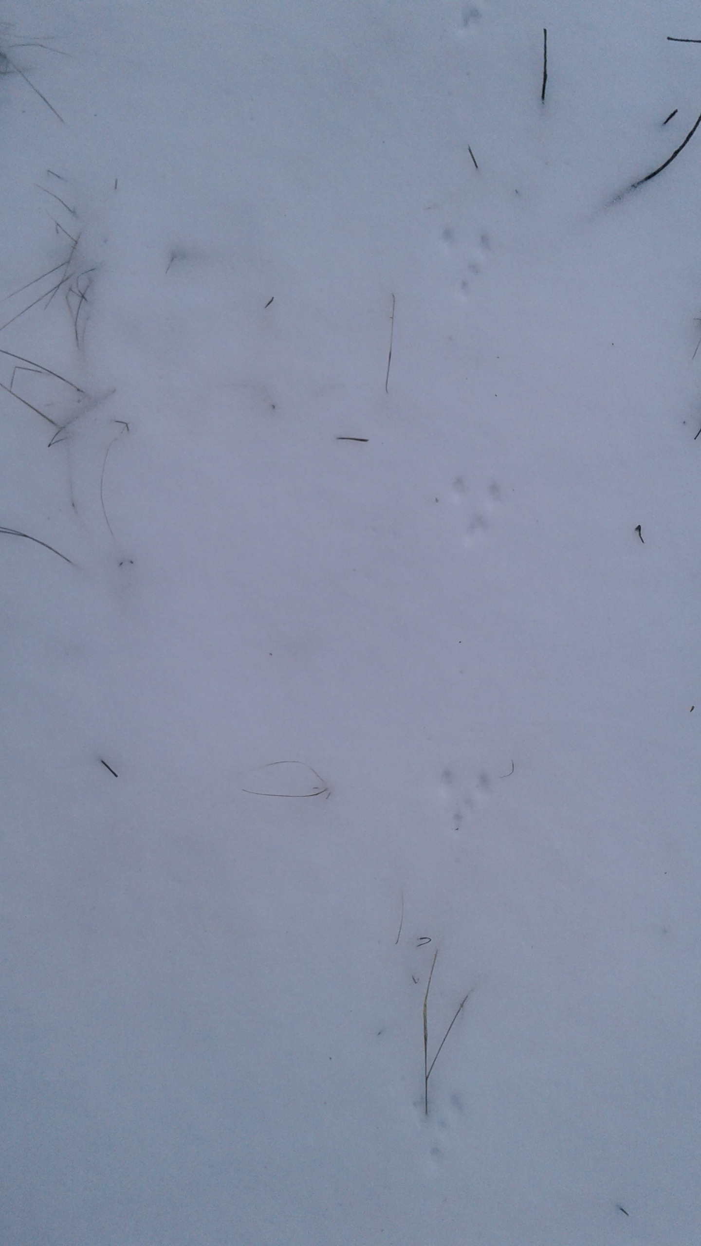 Знято мобілкою Самсунг